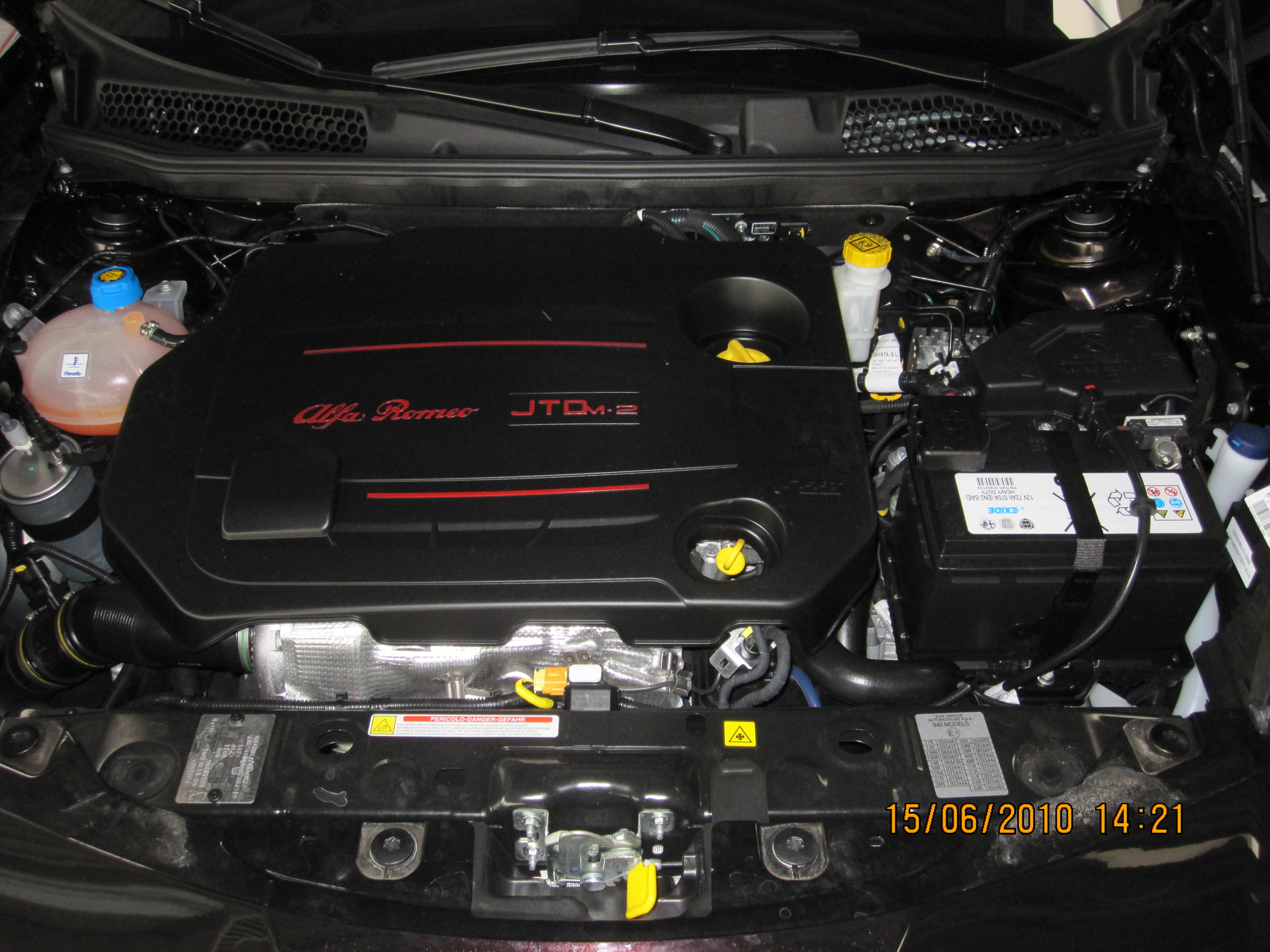 Motore Alfa Romeo JTDm-2 installato in un'Alfa Romeo Giulietta